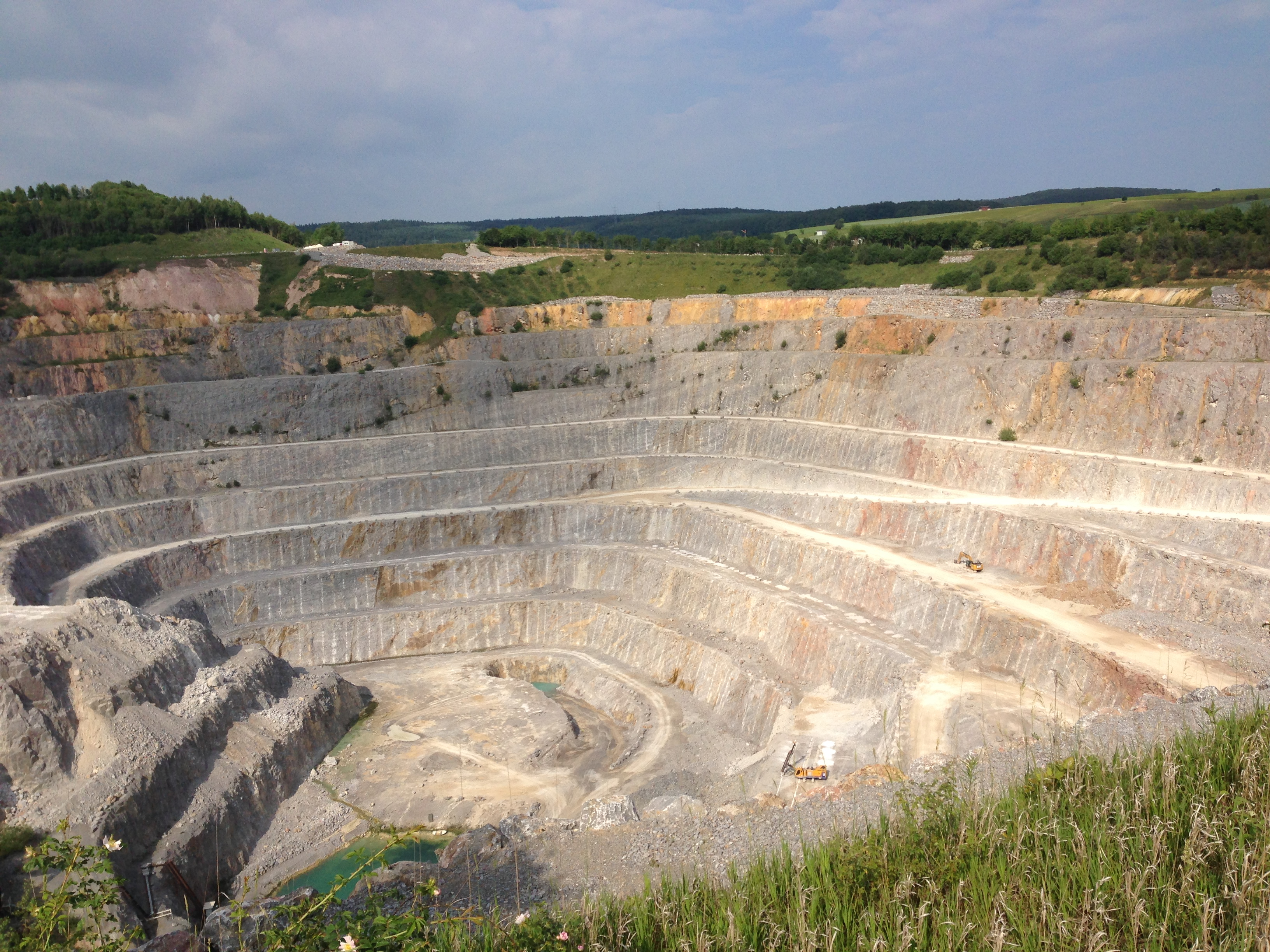 Kalksteinbruch der Firma Schaefer Kalk in Hahnstätten